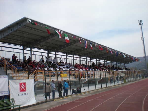 La nuova Tribuna dello stadio "Raffaele Guariglia" di Agropoli